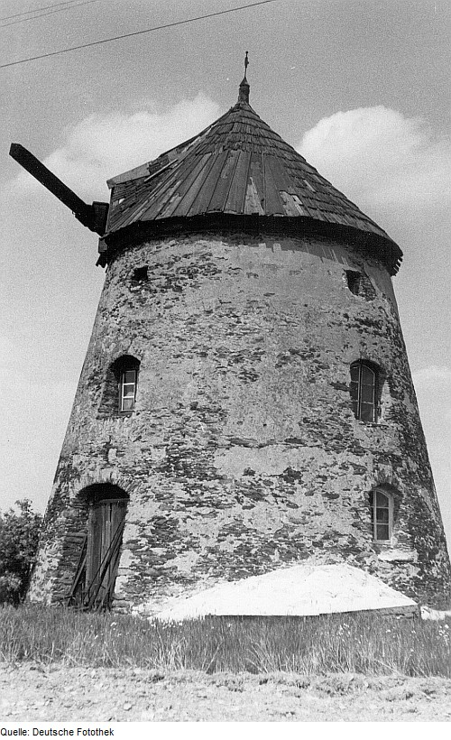 Original image description from the Deutsche FotothekGroßenhain-Weßnitz. Erdholländer